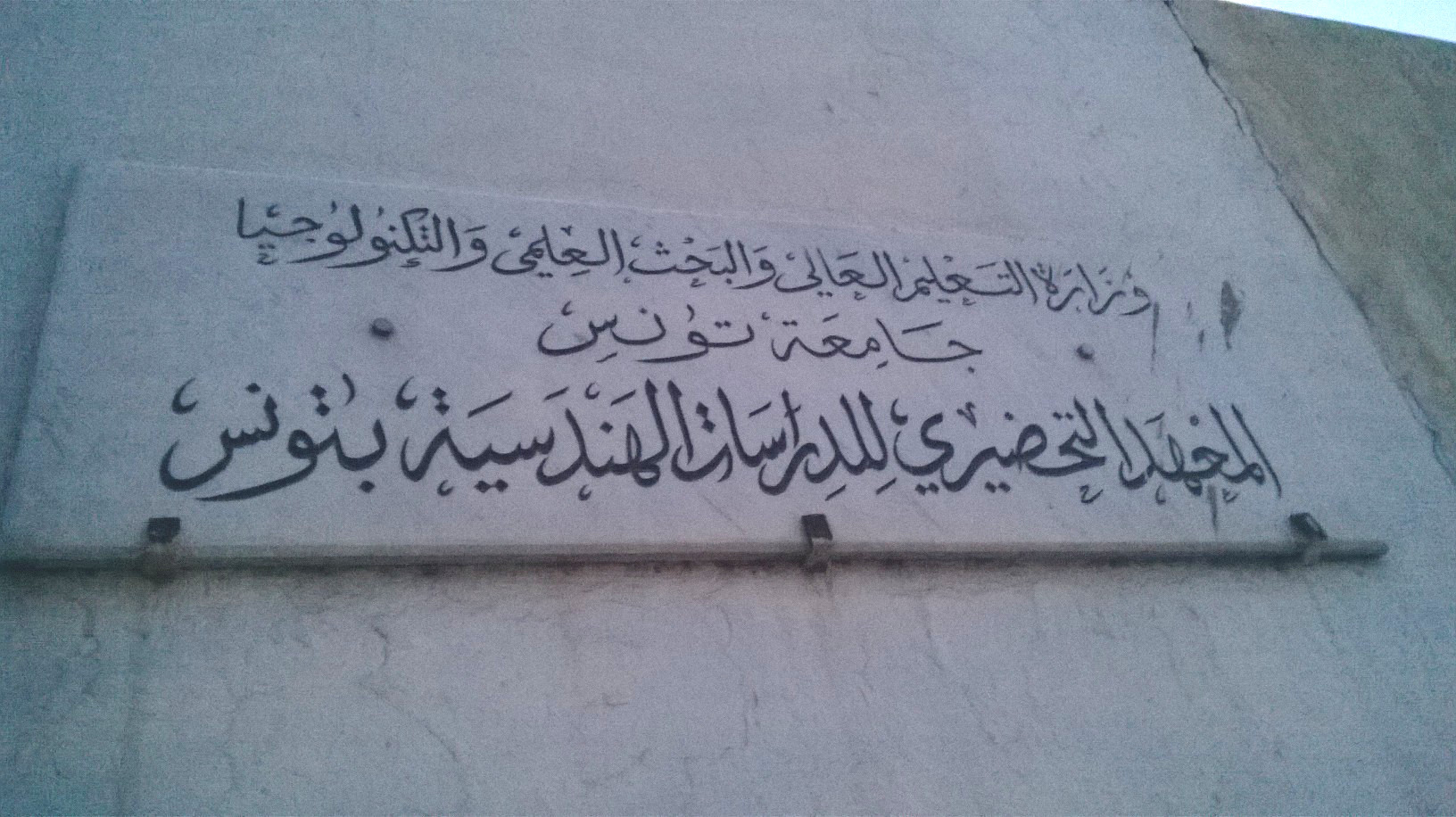 Montfleury , Sidi El Béchir , Tunis مونفلوري ، سيدي البشير ، تونس